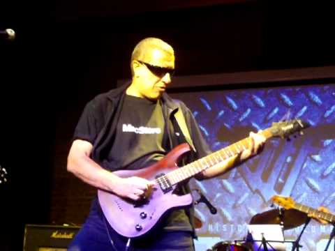 Boff Serafine